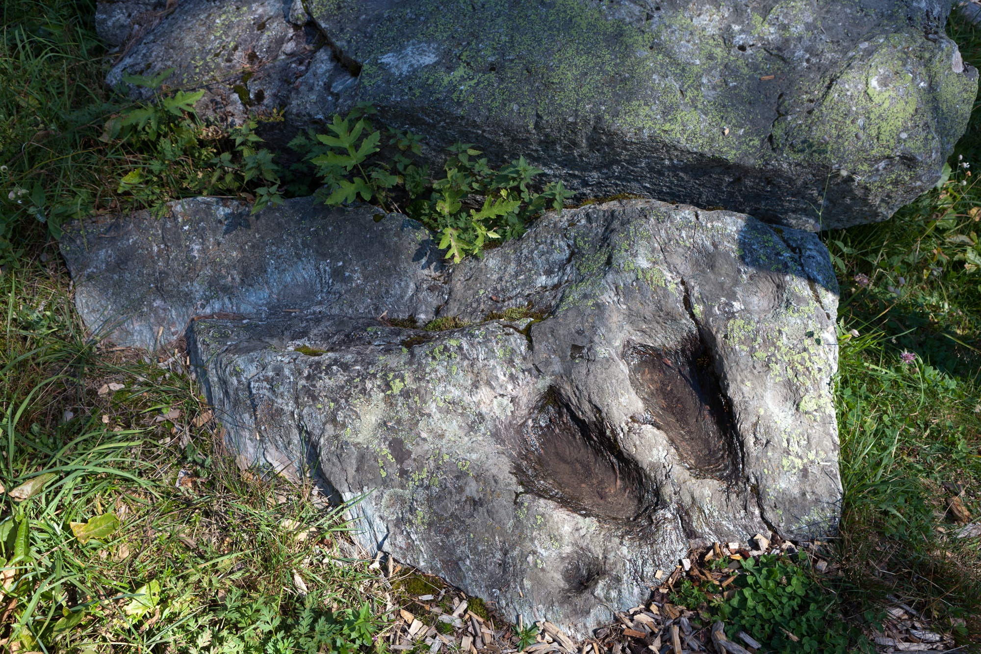 Schalenstein Nr. 6 (Pierre à cupules) in Grimentz. Der Steinblock ist trapezförmig und enthält zwei grössere ovale Vertiefungen, die an Füsse erinnern.